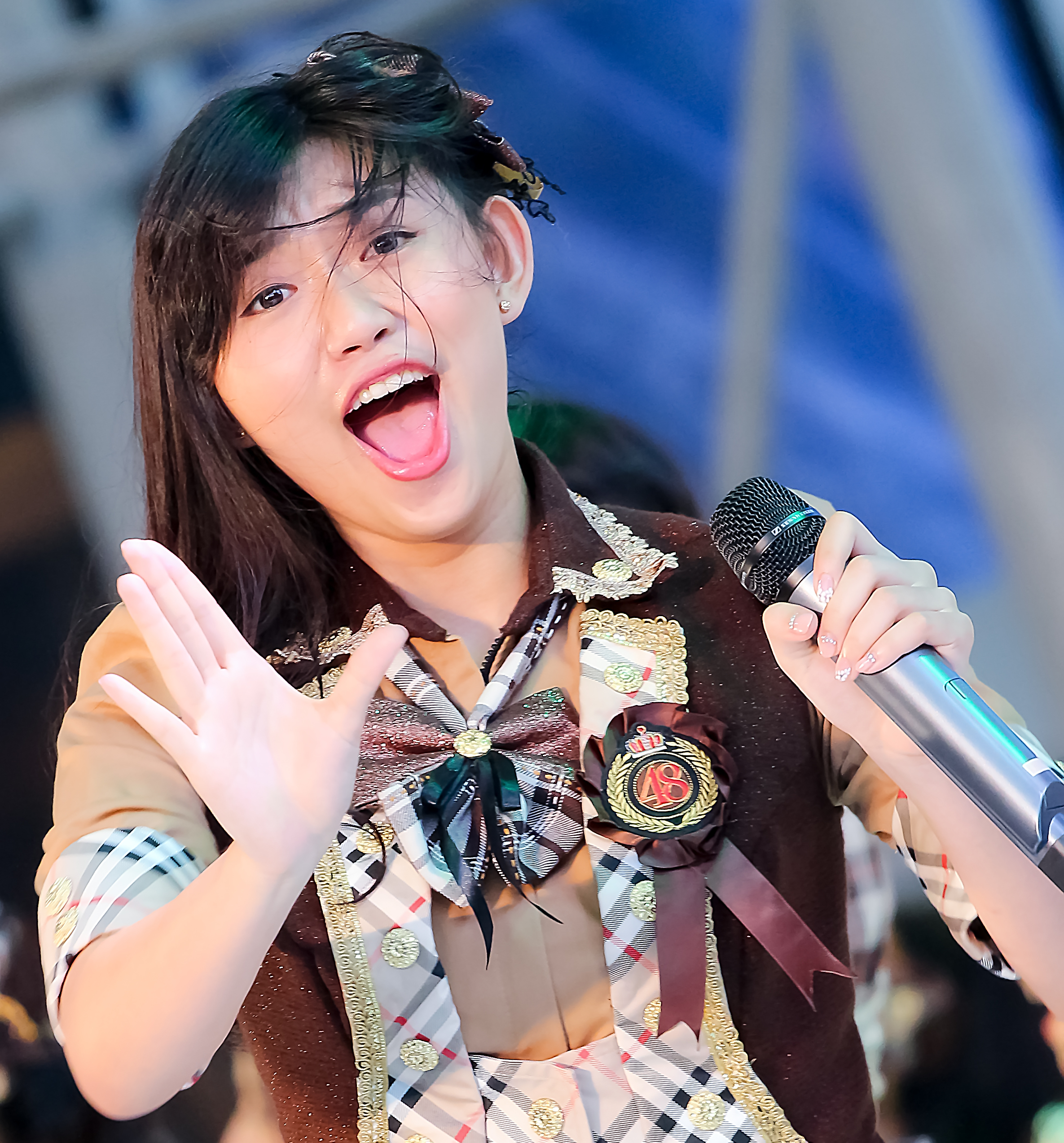 Jennifer Hanna